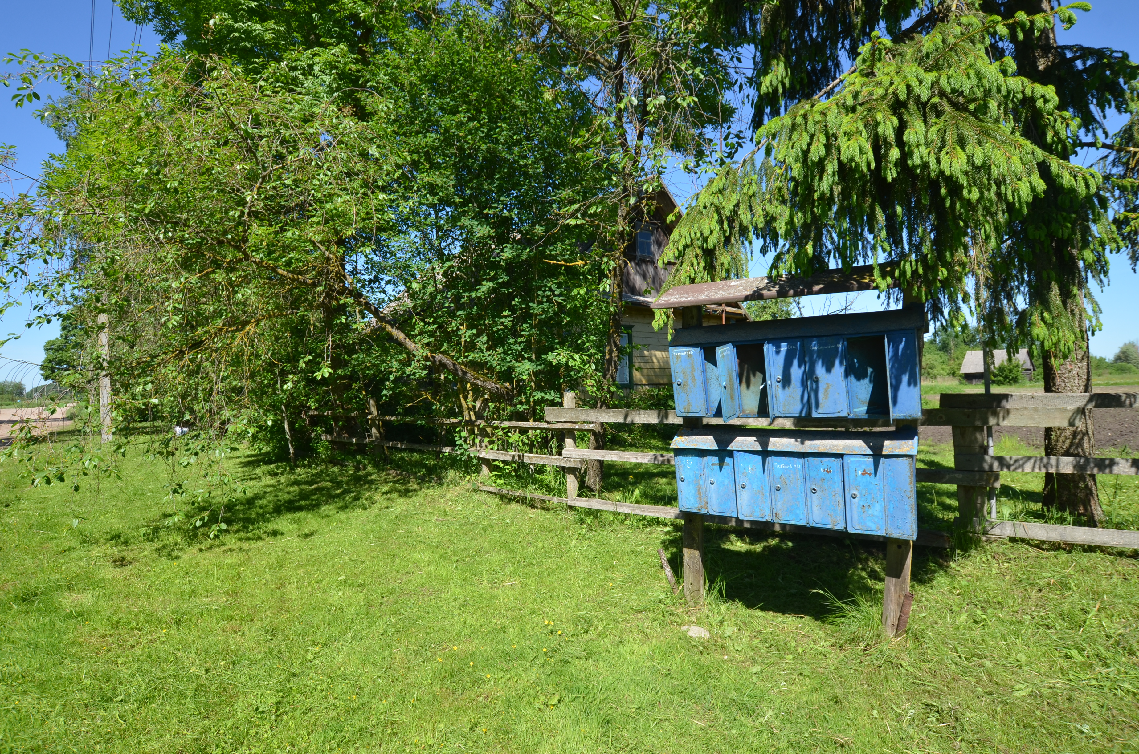 паштовыя скрыні